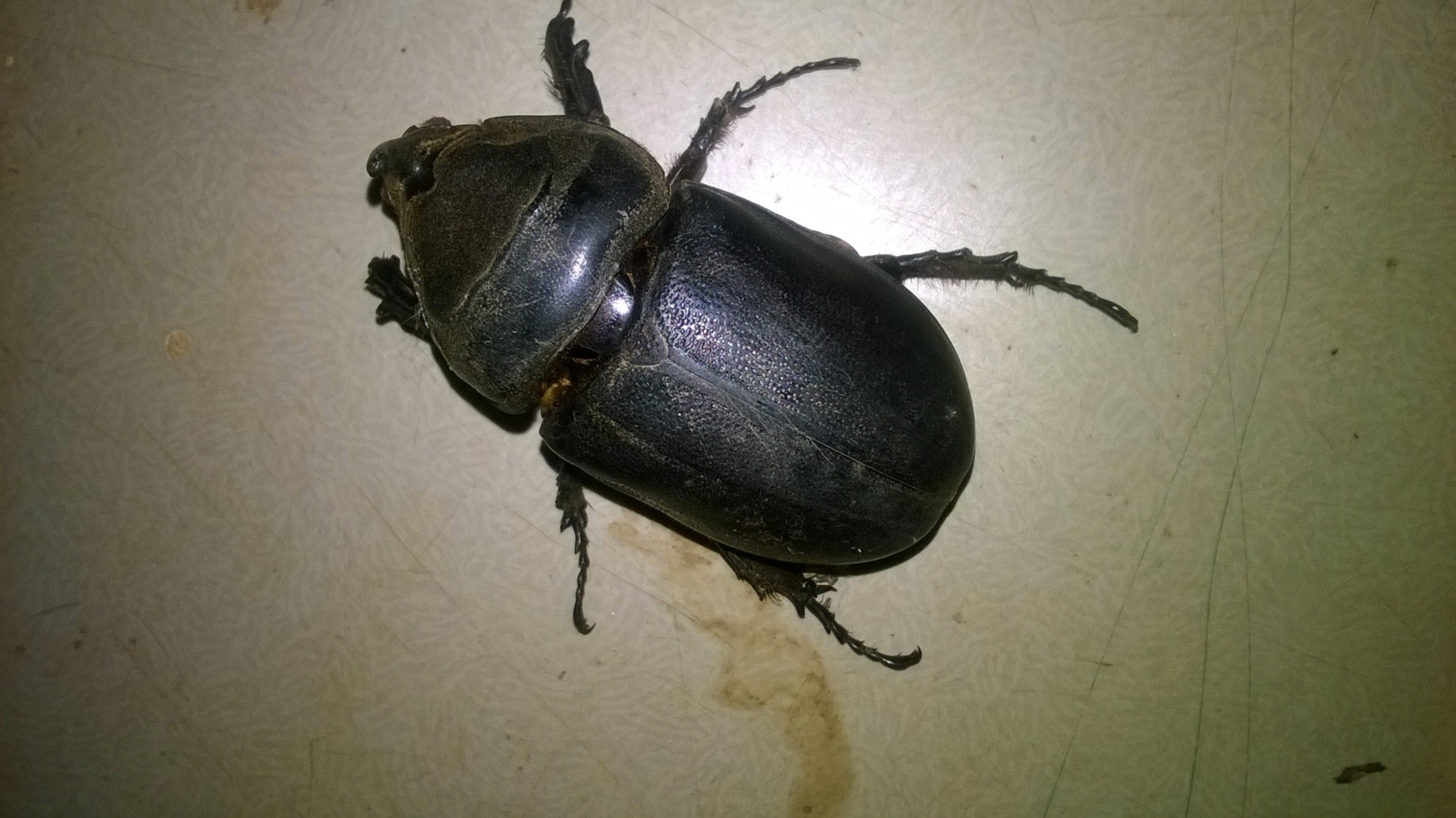 profile dorsale d'un scarabée rhinicéros